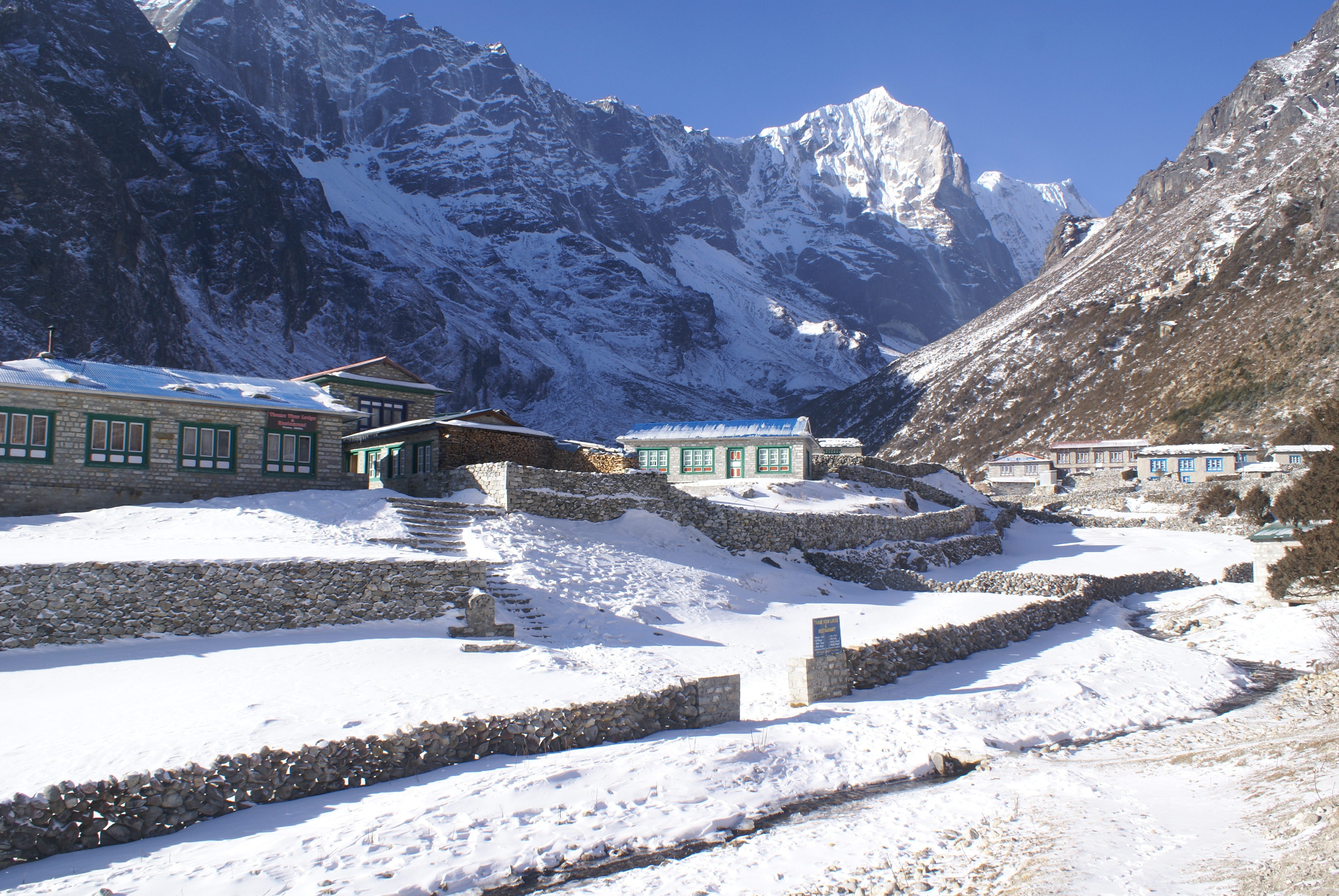 Thame village in snow.